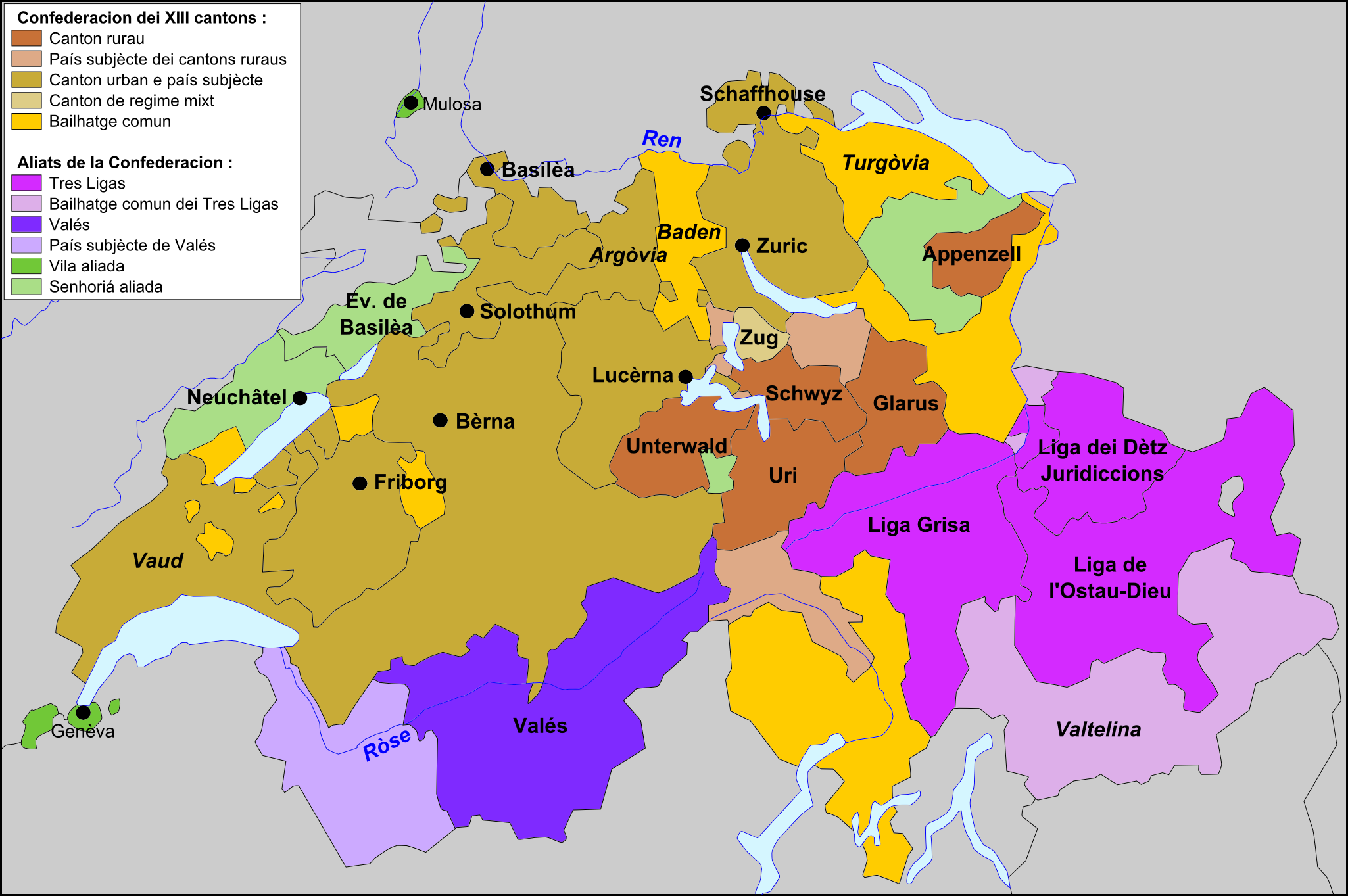 Confederacion dei XIII Cantons avans la Revolucion Francesa.